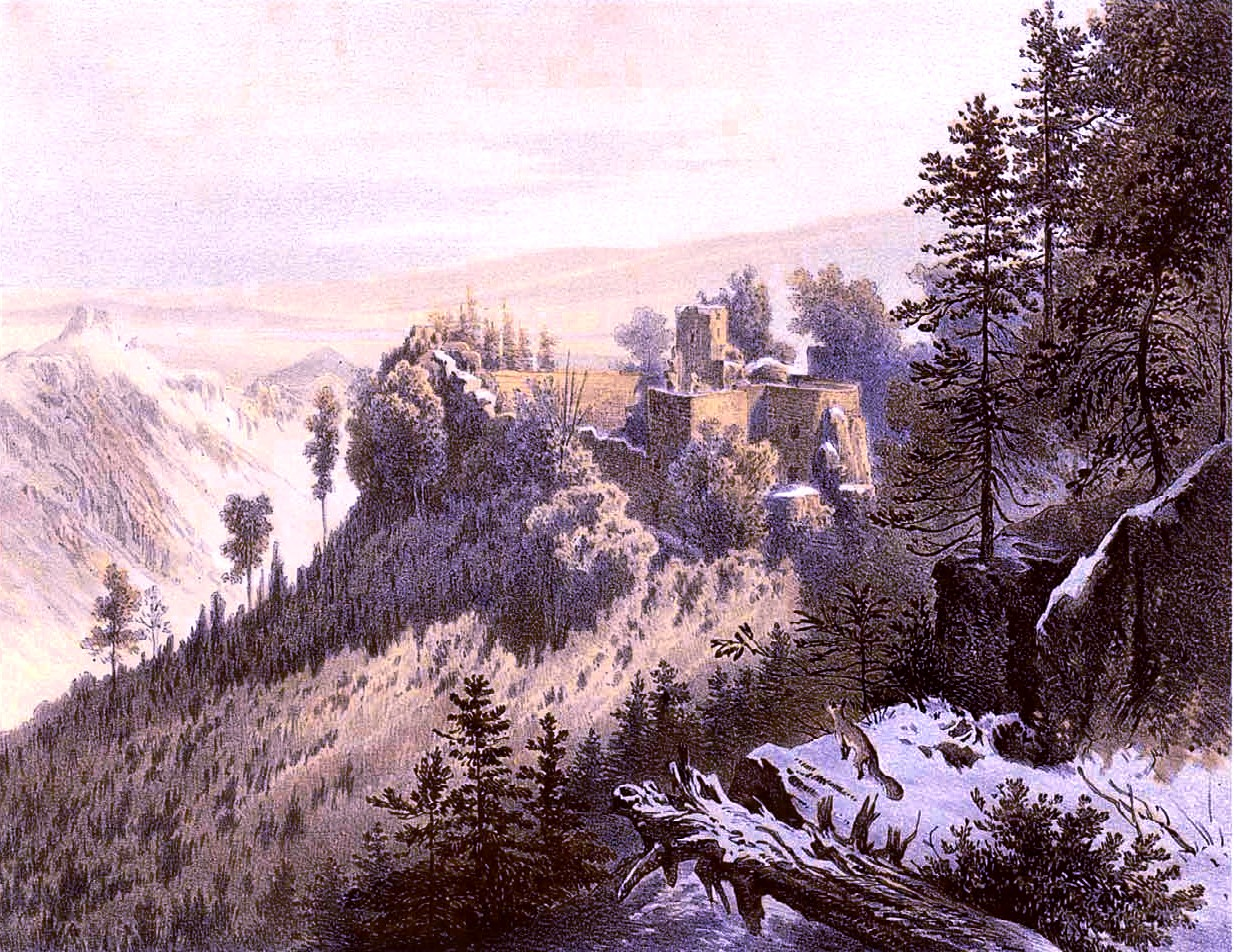 Ruine Bolzenschloss, Kreis Schönau, Lithographie aus der Sammlung Duncker